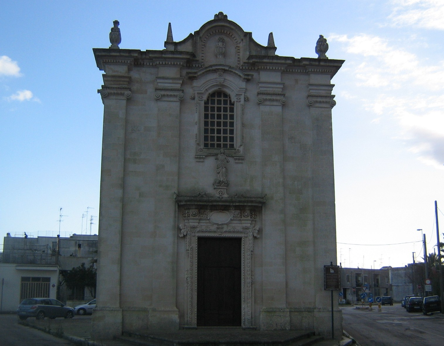 Chiesa della Madonnella Martano